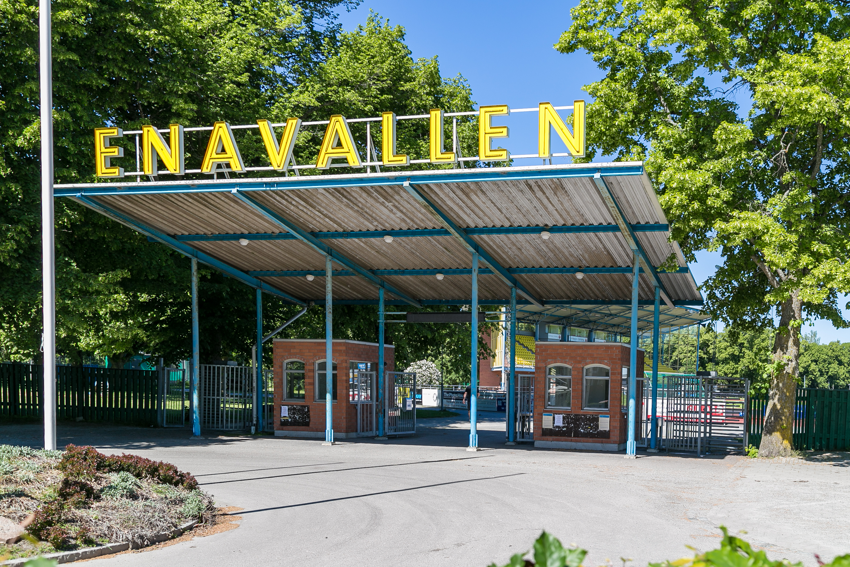 Enavallen, Enköping, Uppsala län, Sverige